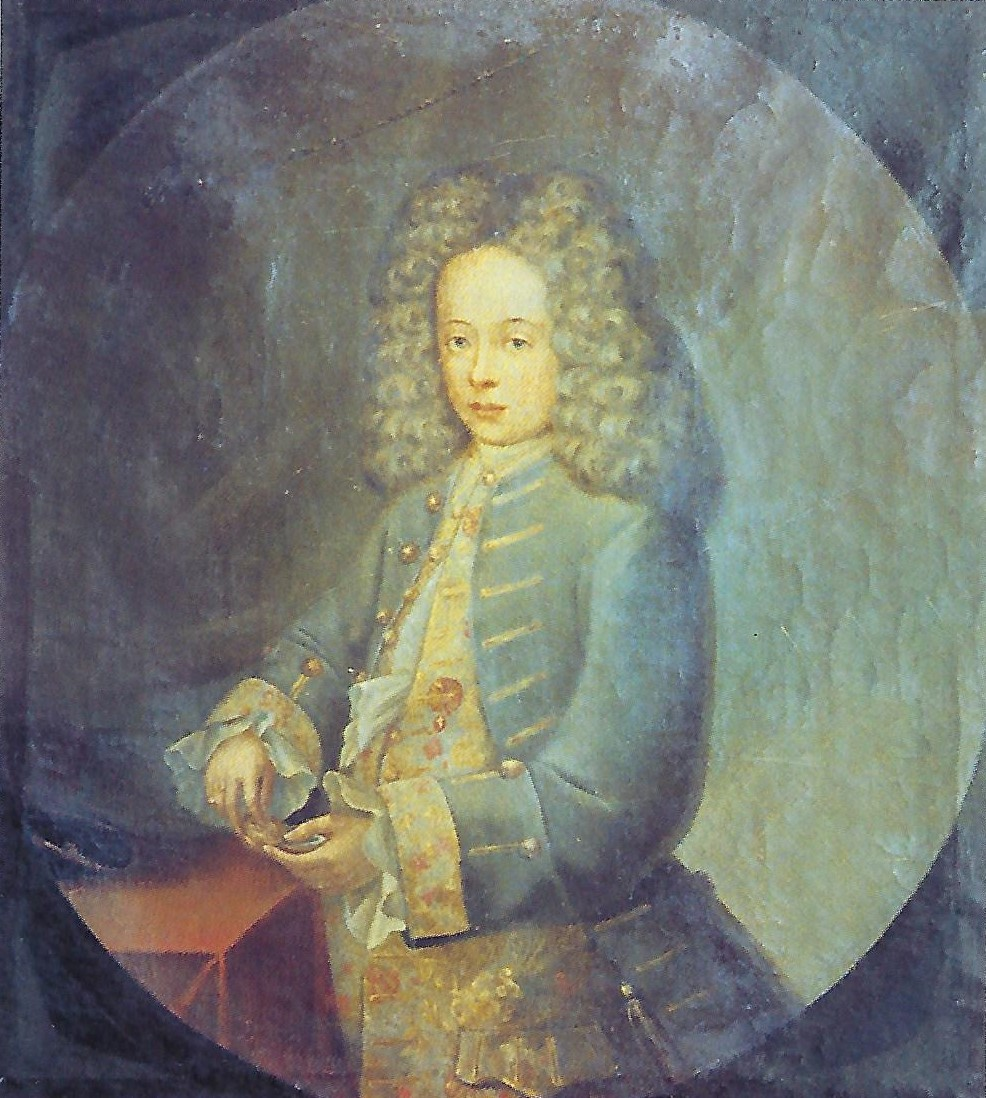 Il giovano Francesco Maria Preti